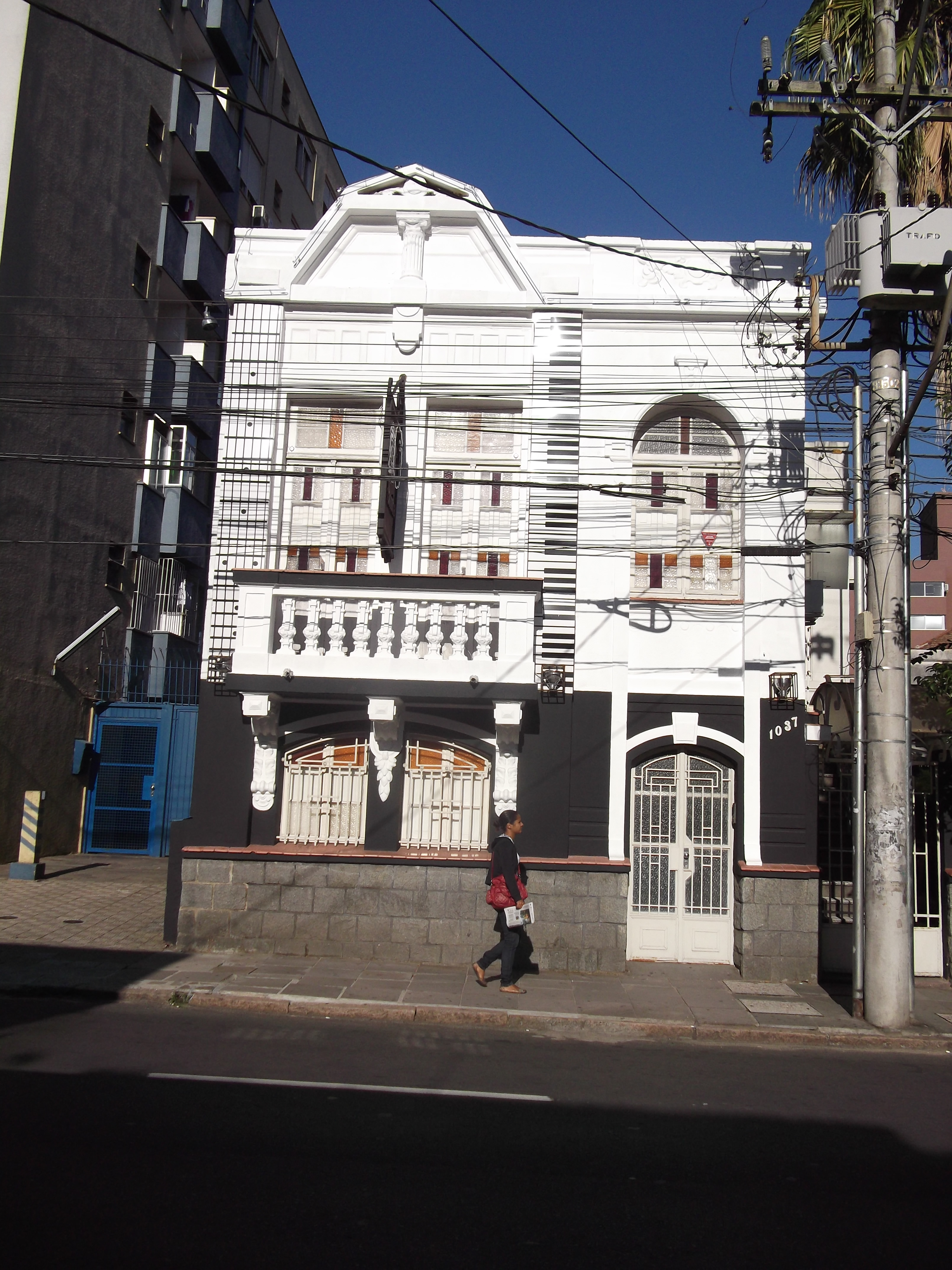 Rua General Lima e Silva n 1037, Cidade Baixa, Porto Alegre